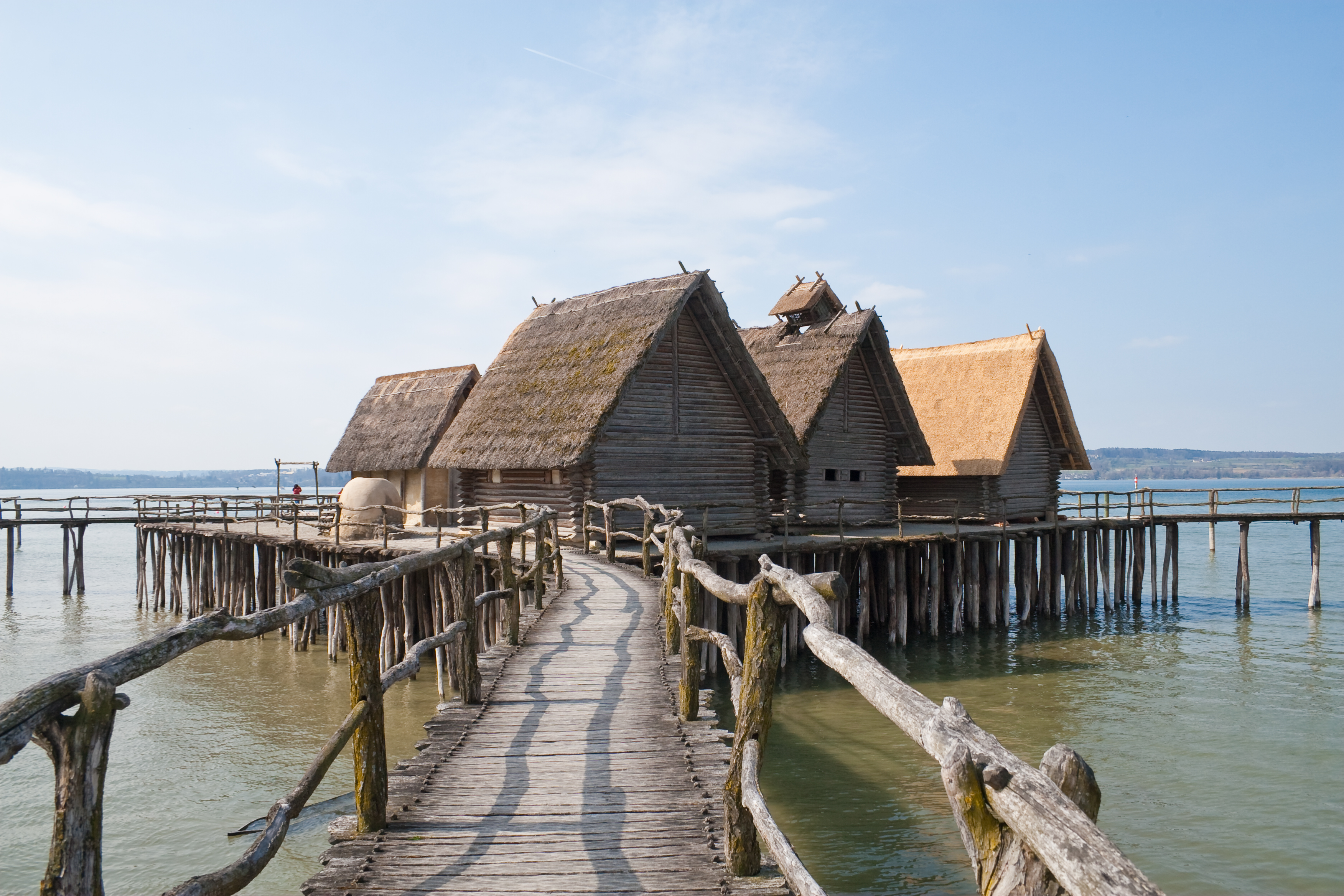 Pfahlbaumuseum Unteruhldingen, Uhldingen-Mühlhofen, Baden-Württemberg, Germany